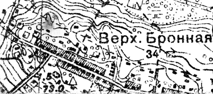 Топографическая карта Ленинградской области, квадрат О-35-12-А-б (Мал. Ижора), деревня Верхняя Бронна